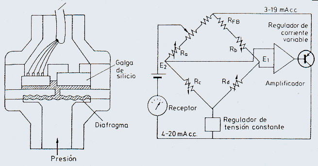 Puente de Wheatstone